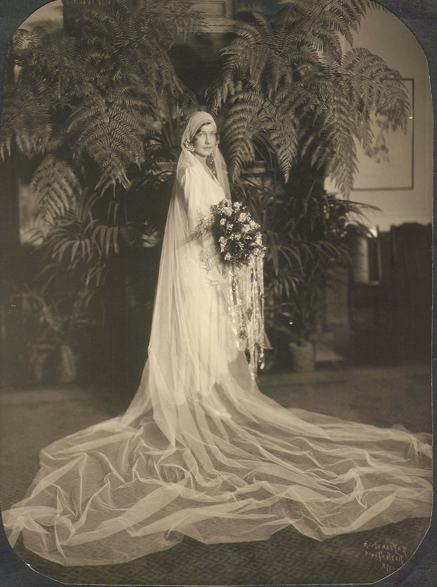 Bride in wedding dress